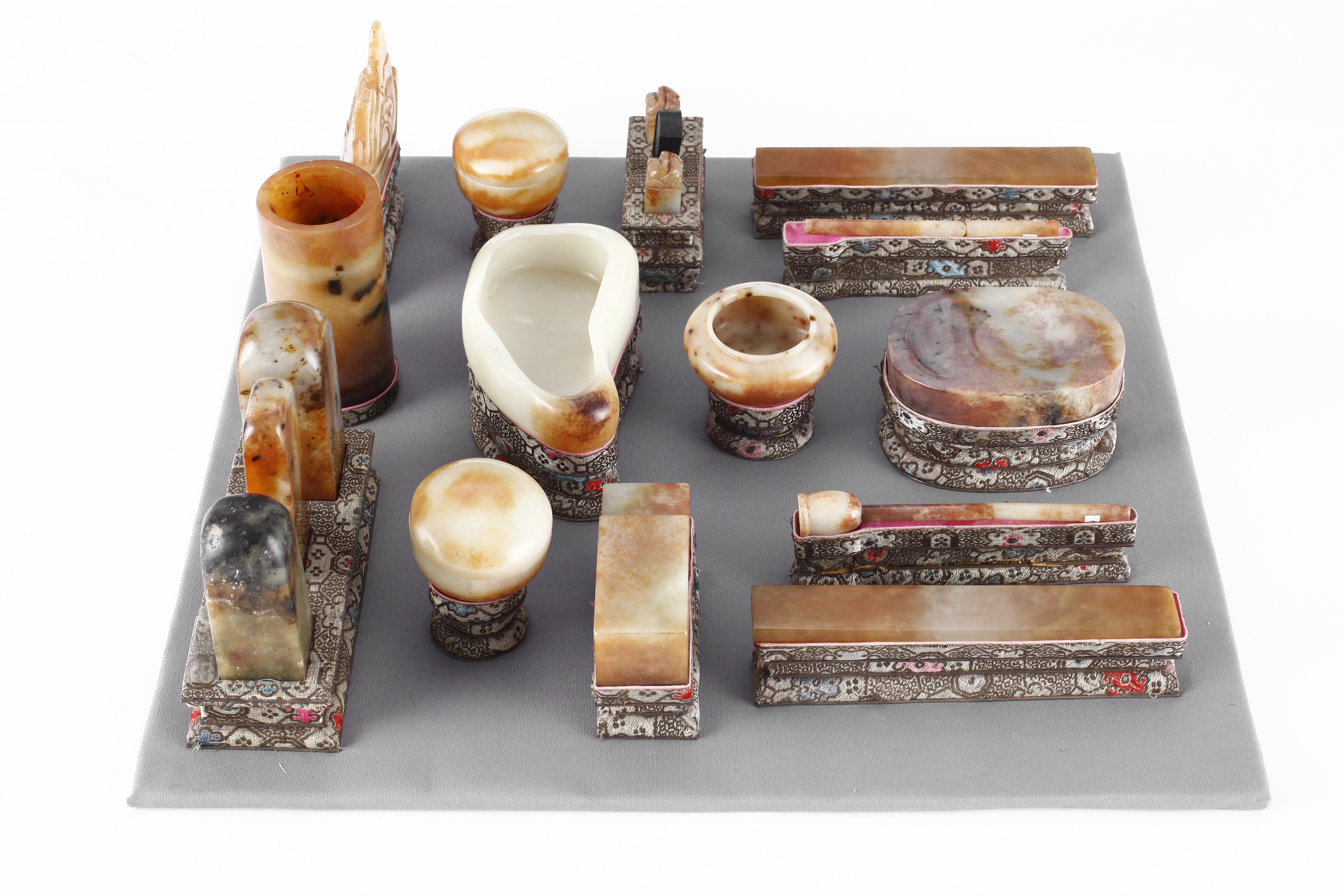 Монгол: Богд хааны бичгийн хэрэглэл